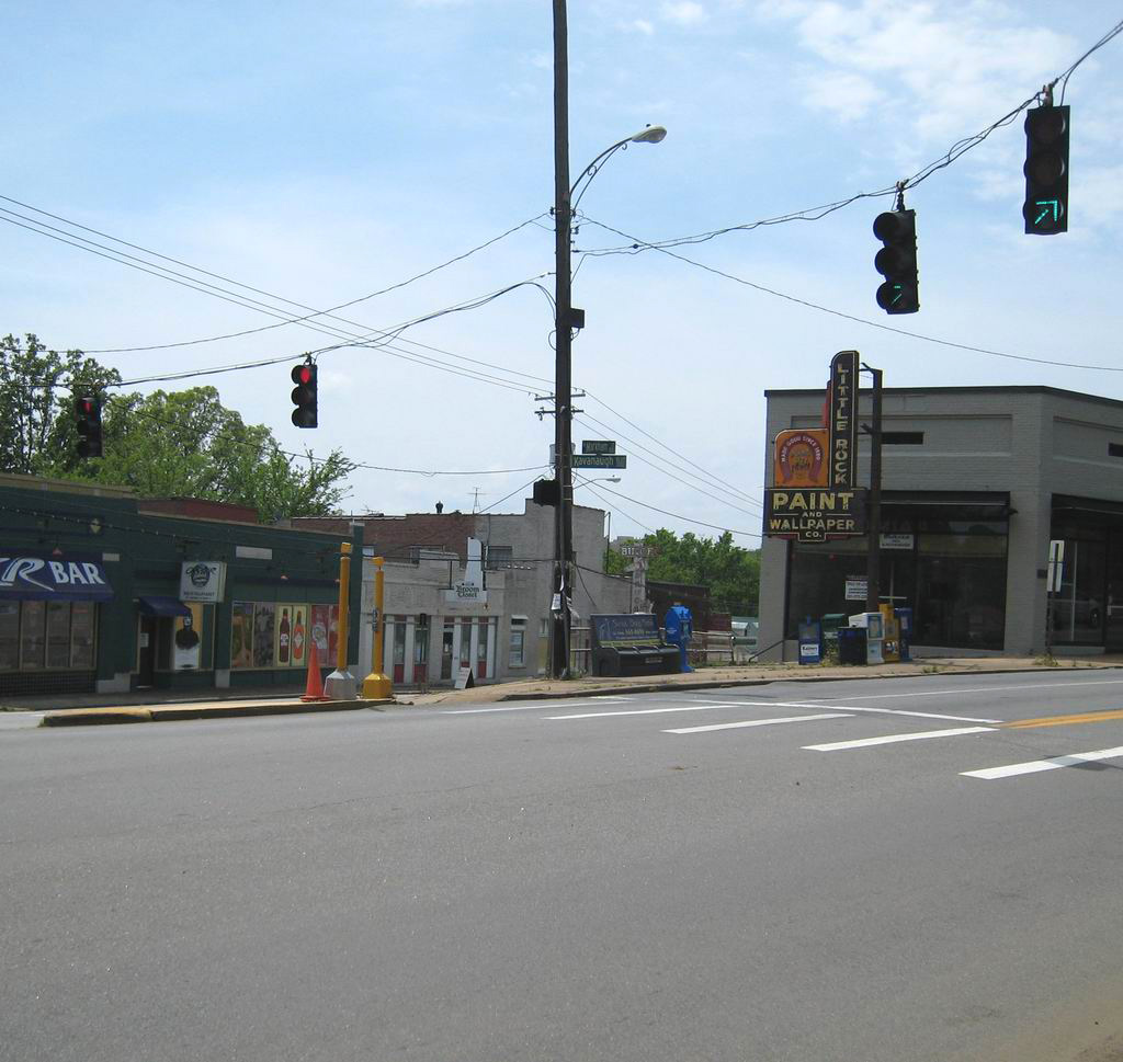 Midday at Kavanaugh and Markham in Little Rock, Arkansas